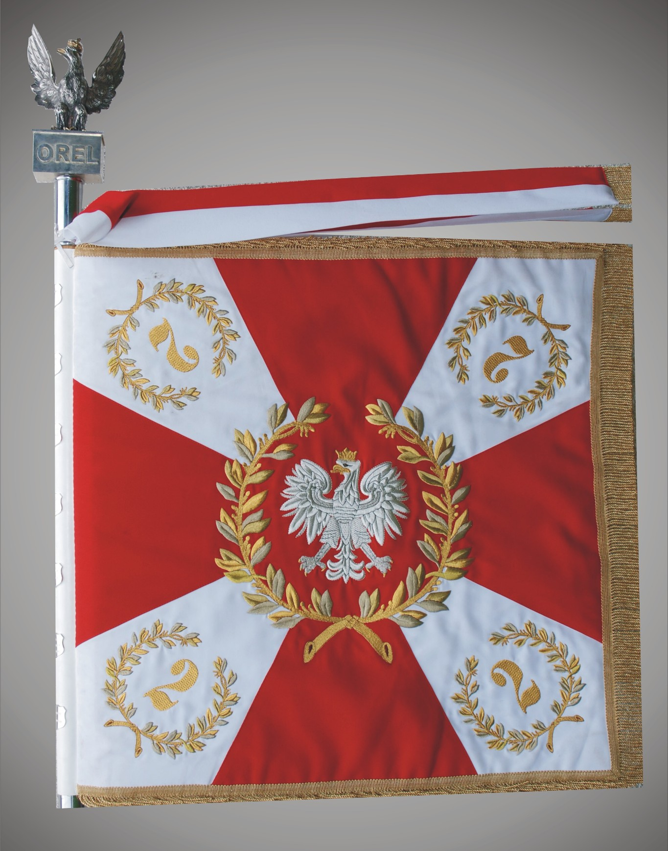 Przasnysz 2007, sala tradycji - sztandar 2 ORel